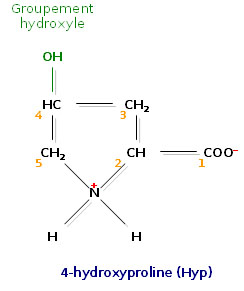 4-hydroxyproline (Hyp).jpg